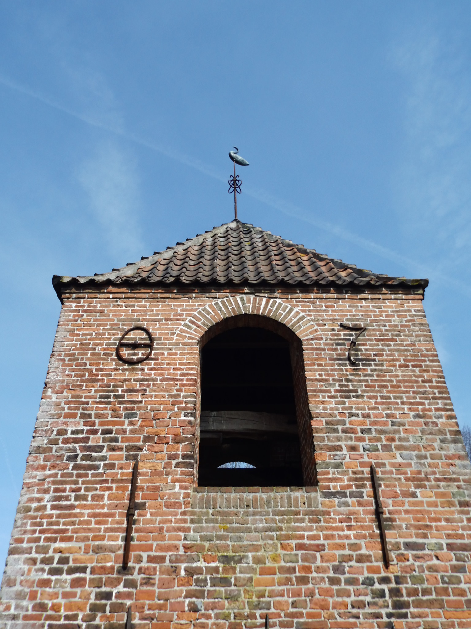 Freistehender Glockenturm der Ardorfer Kirche, Ardorf, Stadtteil der Stadt Wittmund, Landkreis Wittmund, Niedersachsen, Deutschland